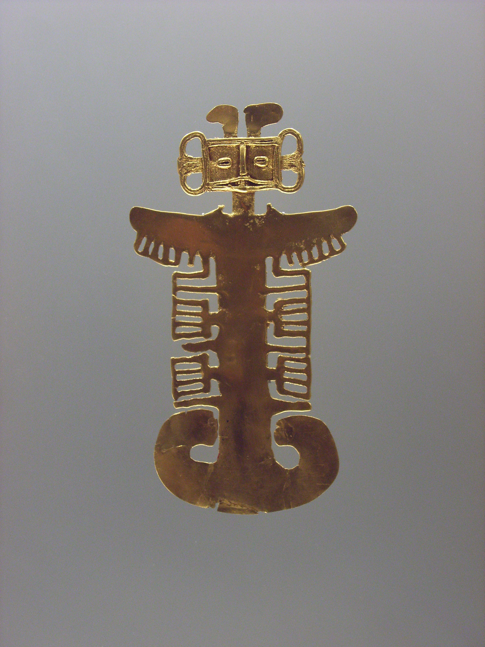 Museo del Oro, Bogotá